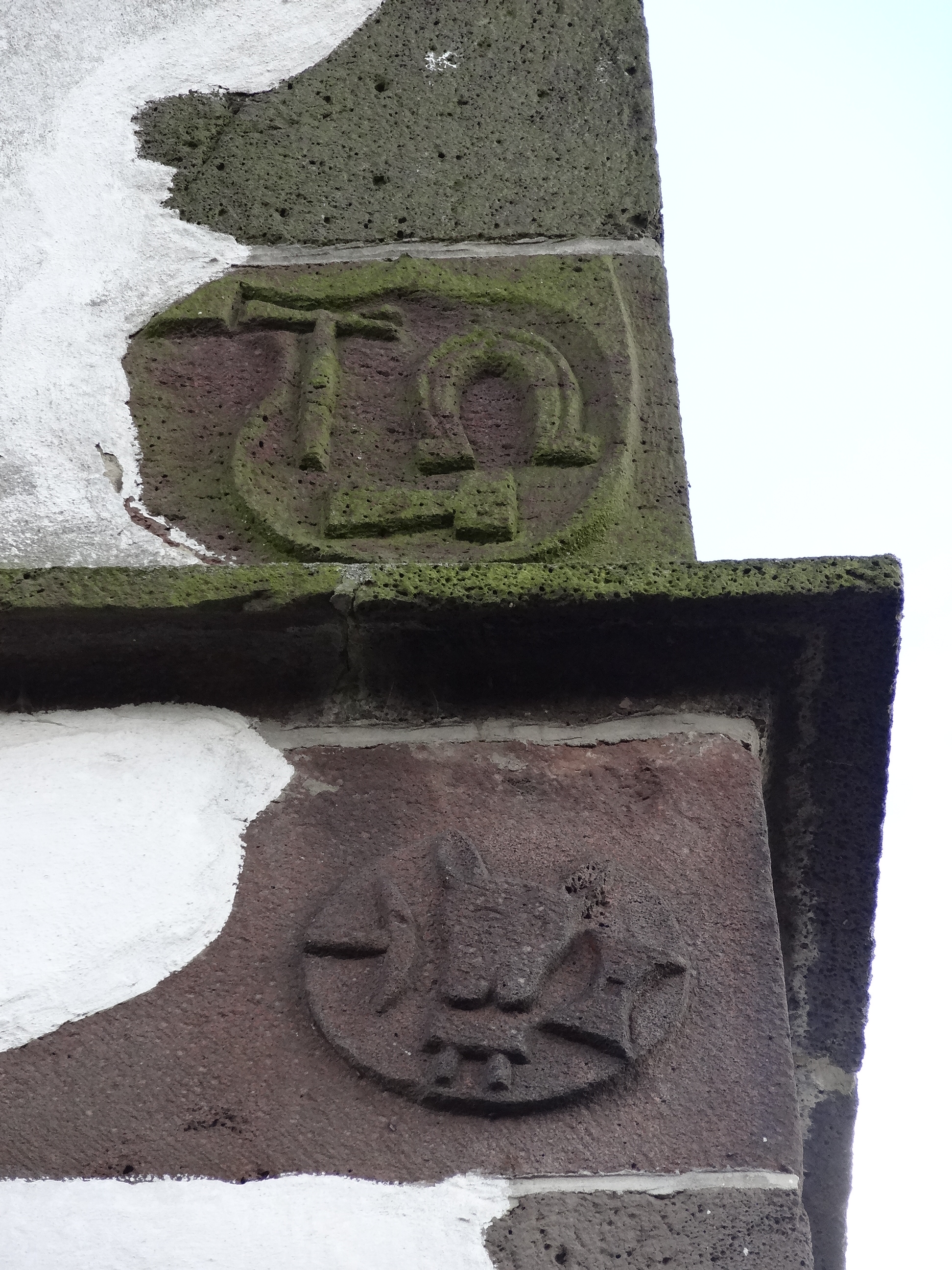 Evangelische Kirche (Nieder-Bessingen)